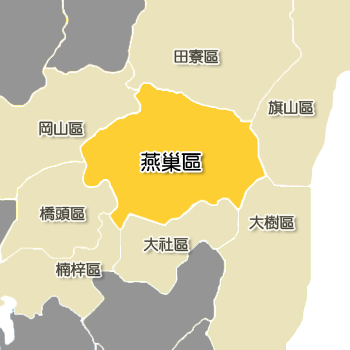 高雄市燕巢區相對位置。